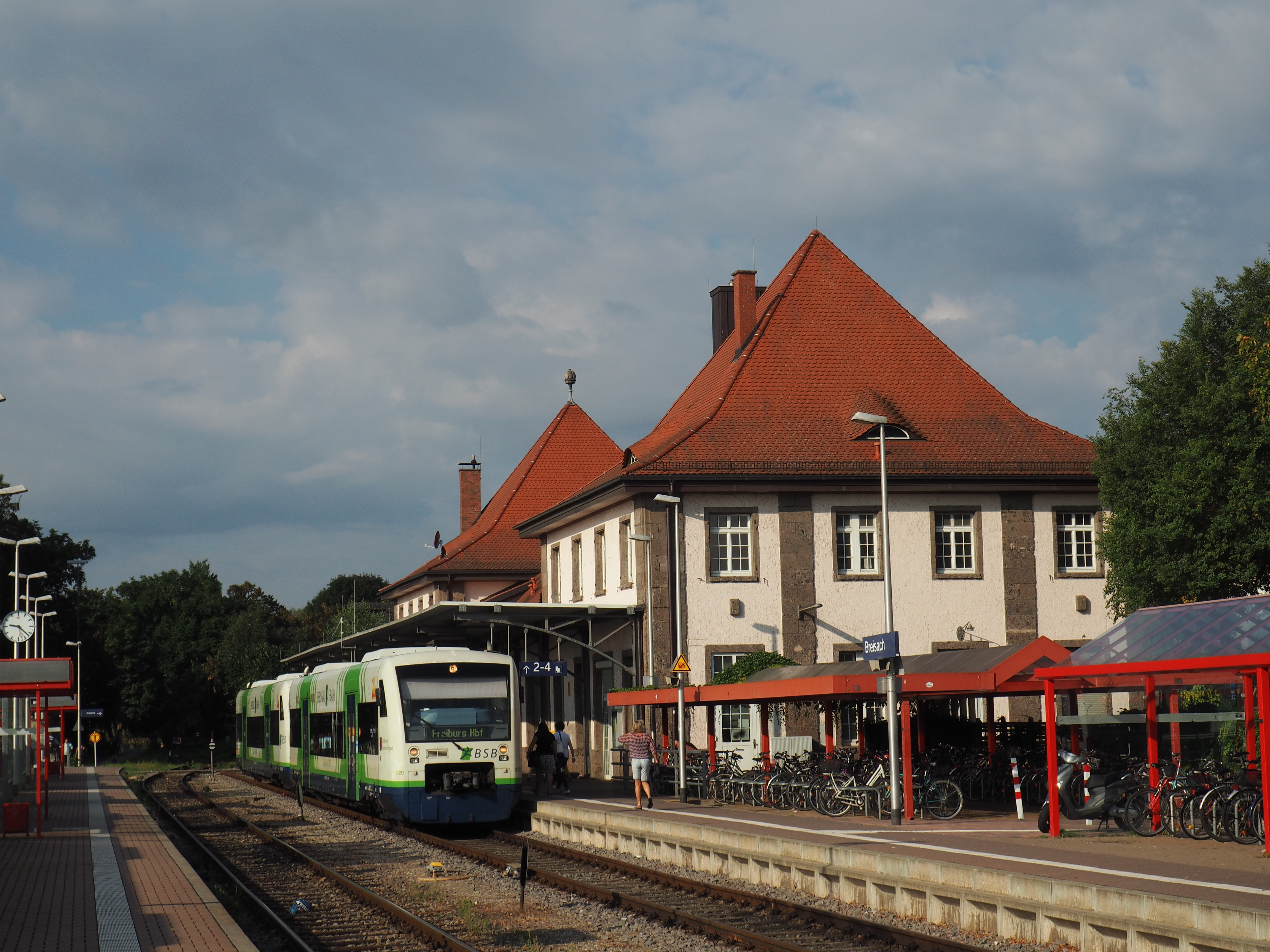 Triebwagen BSB VT 020 (650 047-3) im Bahnhof Breisach.